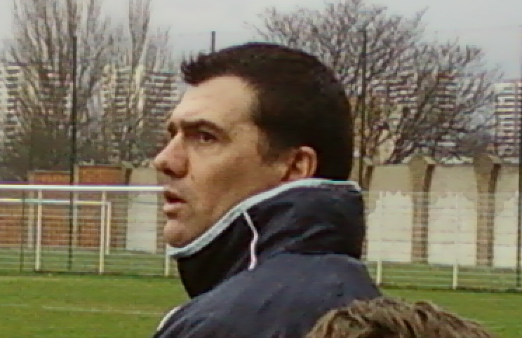 Pierre-Yves David lors du match Paris FC B-Chartres du 13 mars 2011